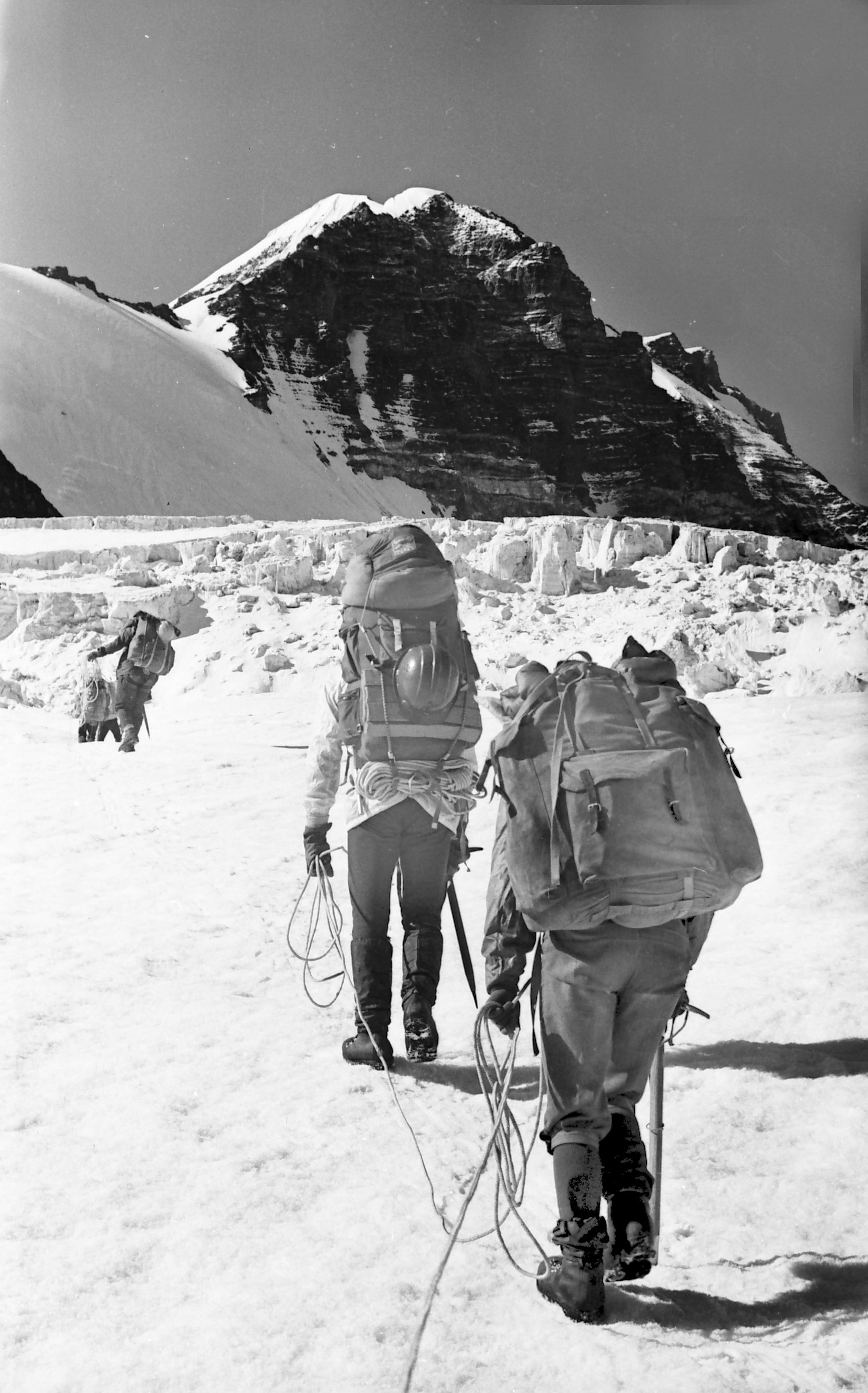 Ekspeditsioon mäetipule "Tartu Ülikool 350".